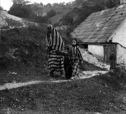 Bosna - muslimka